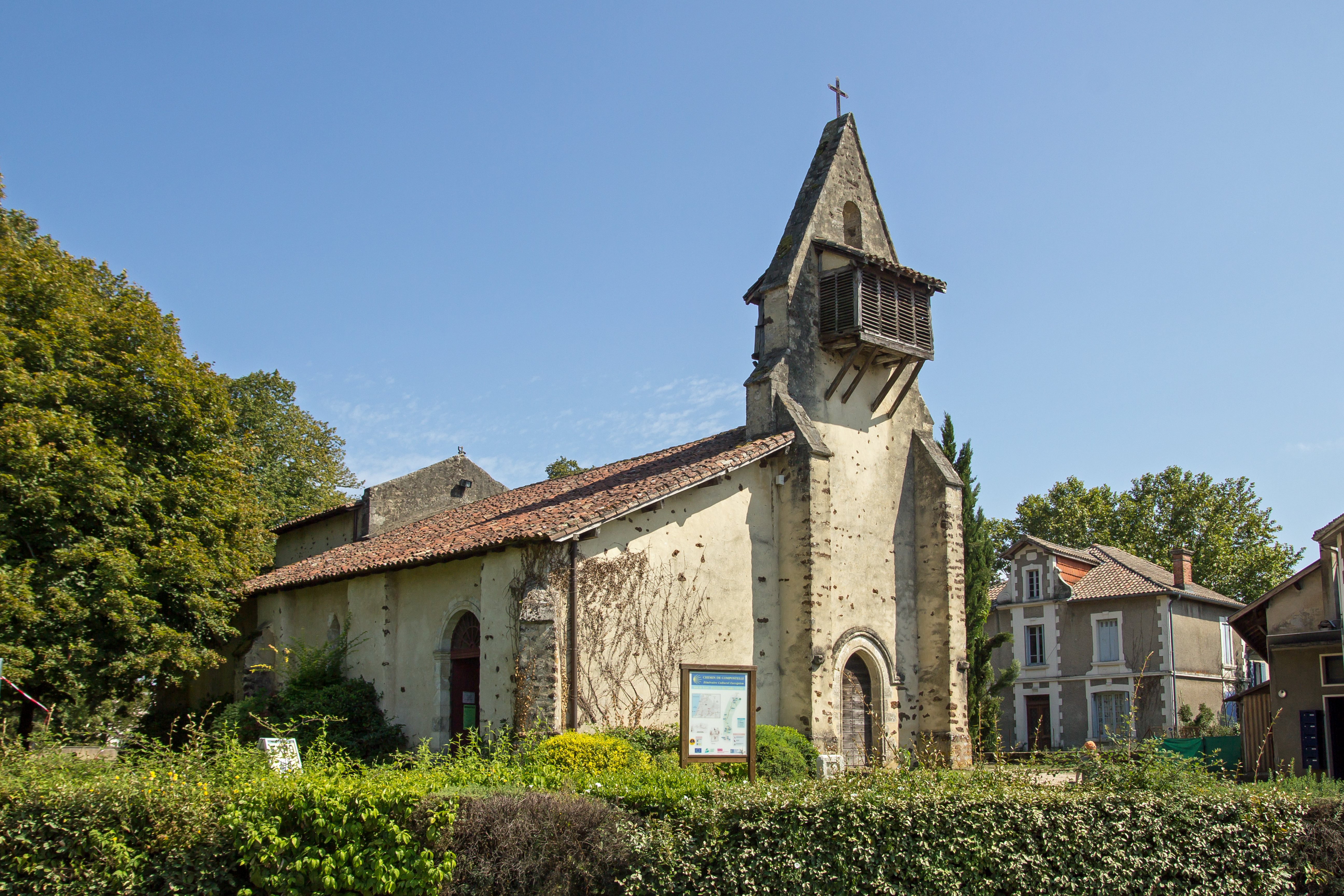 Église Notre-Dame de Moustey (Inscrit) .